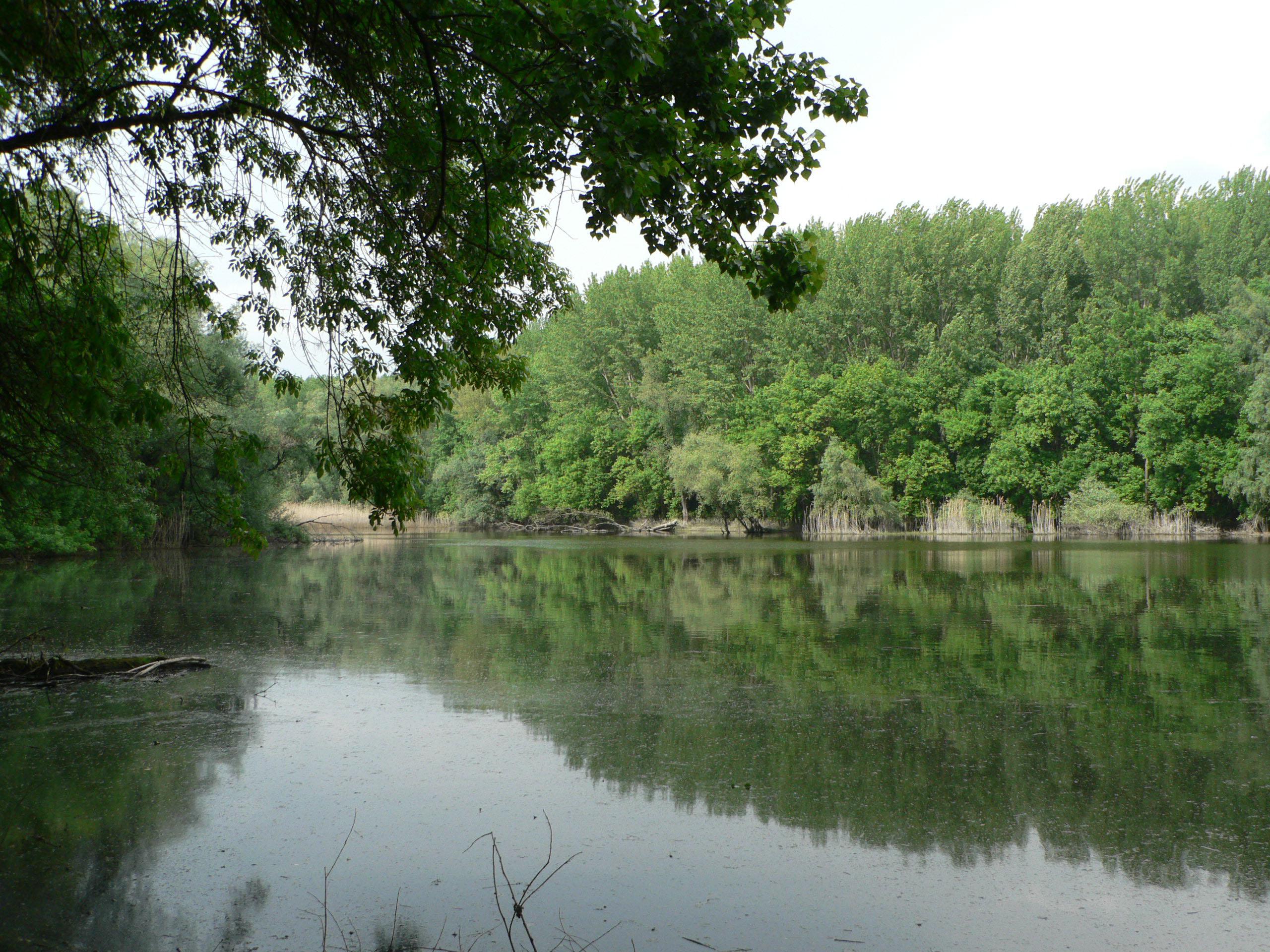 Ковиљско-петроварадински рит Licensing